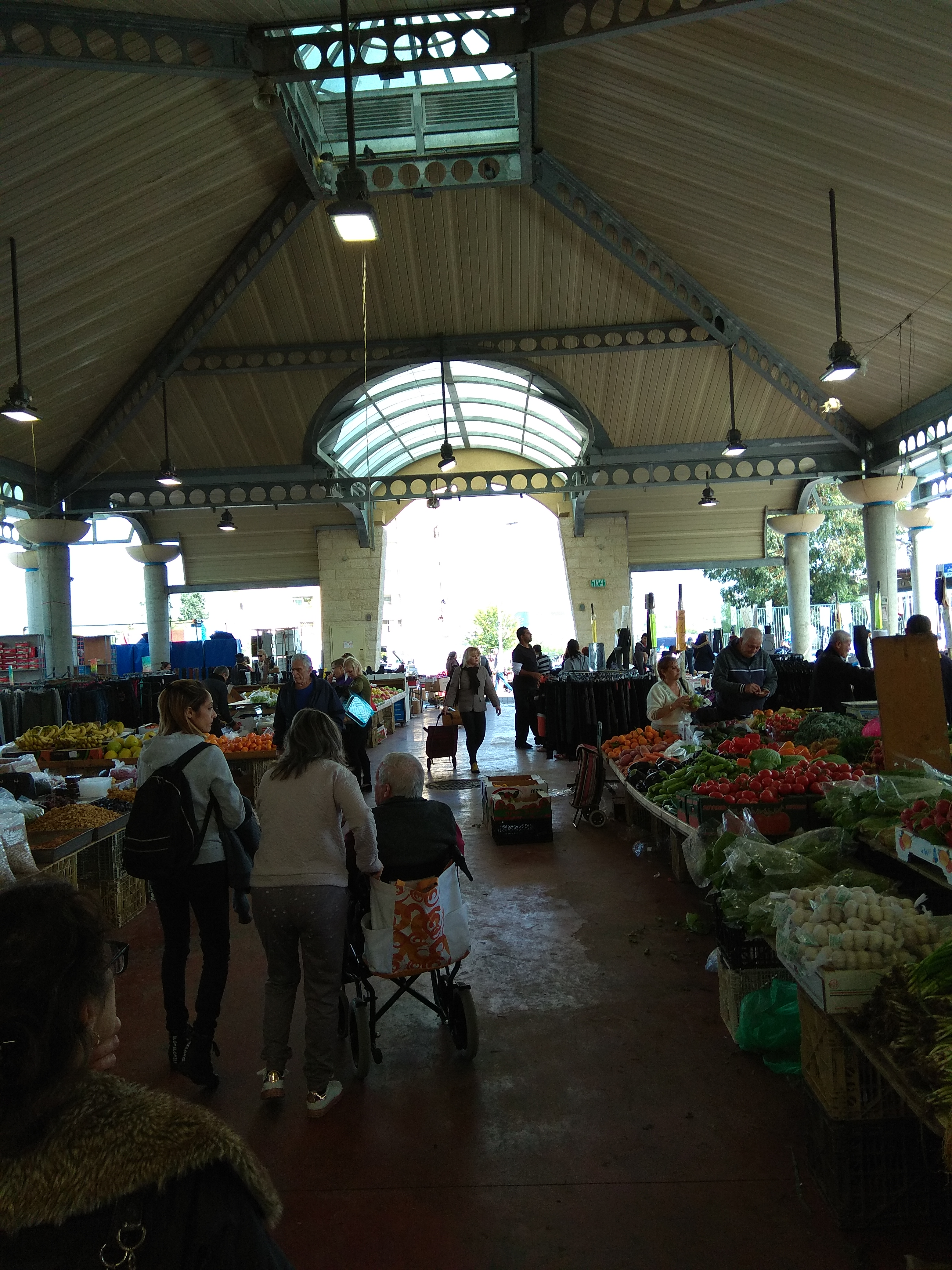 שוק מגדל העמק